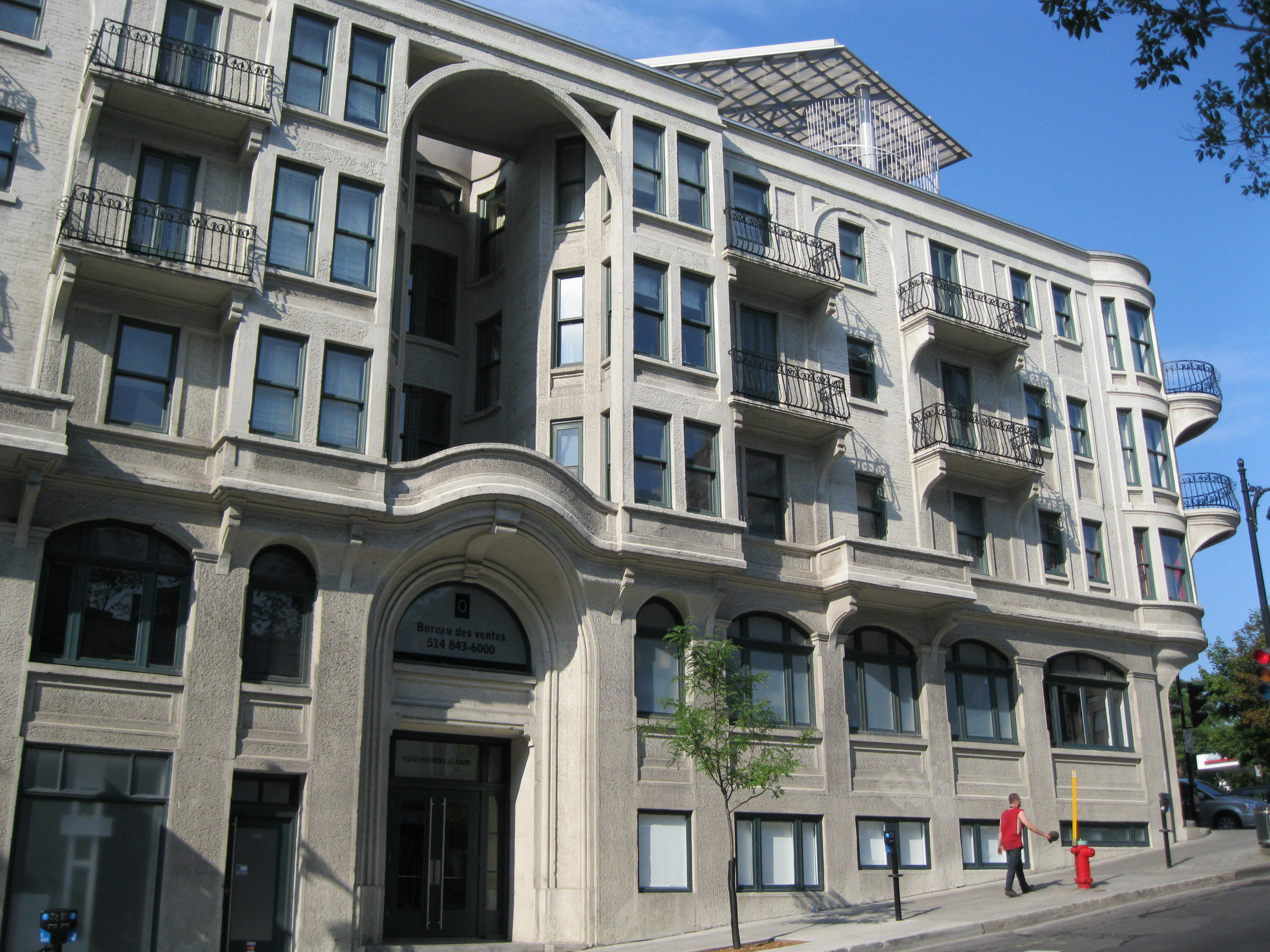 L'édifice Joseph-Arthur-Godin, classé monument historique, est un ancien immeuble de rapport construit en 1914. Il est situé au 2112, boulevard Saint-Laurent, Montréal. Répertoire du patrimoine culturel québécois